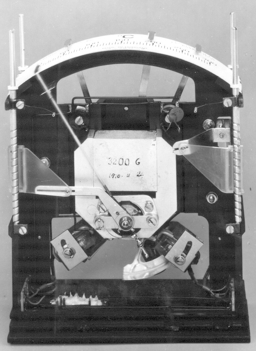 Lengőtekercses műszer határérték kapcsolókkal. A kép alsó részén látható, kívülről állítható helyzetű tekercsek közötti induktív csatolást a lengőtekerccsel együtt elforduló alumíniumból készült alkatrész a beállított érték elérésekor megszünteti.